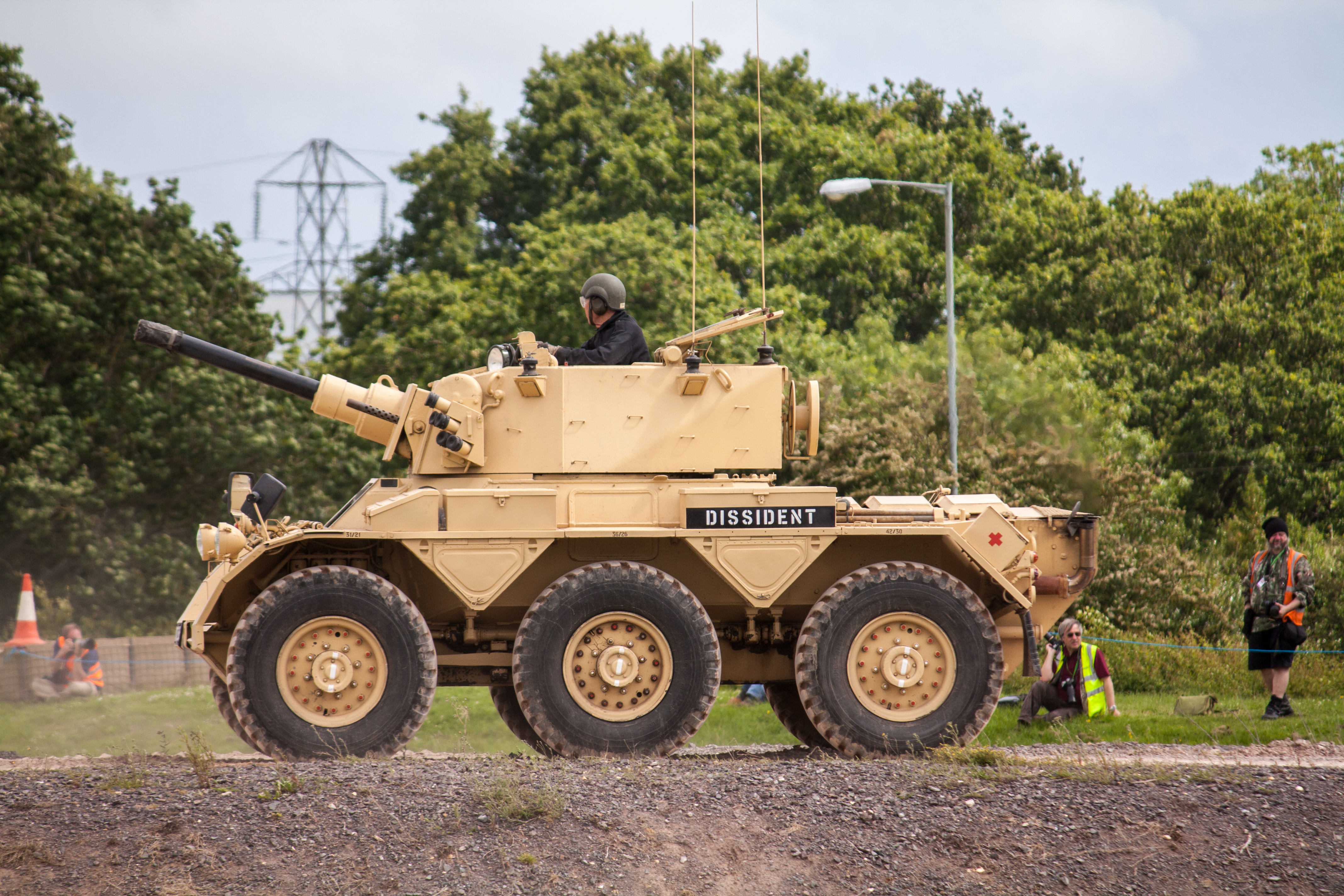 Saladin